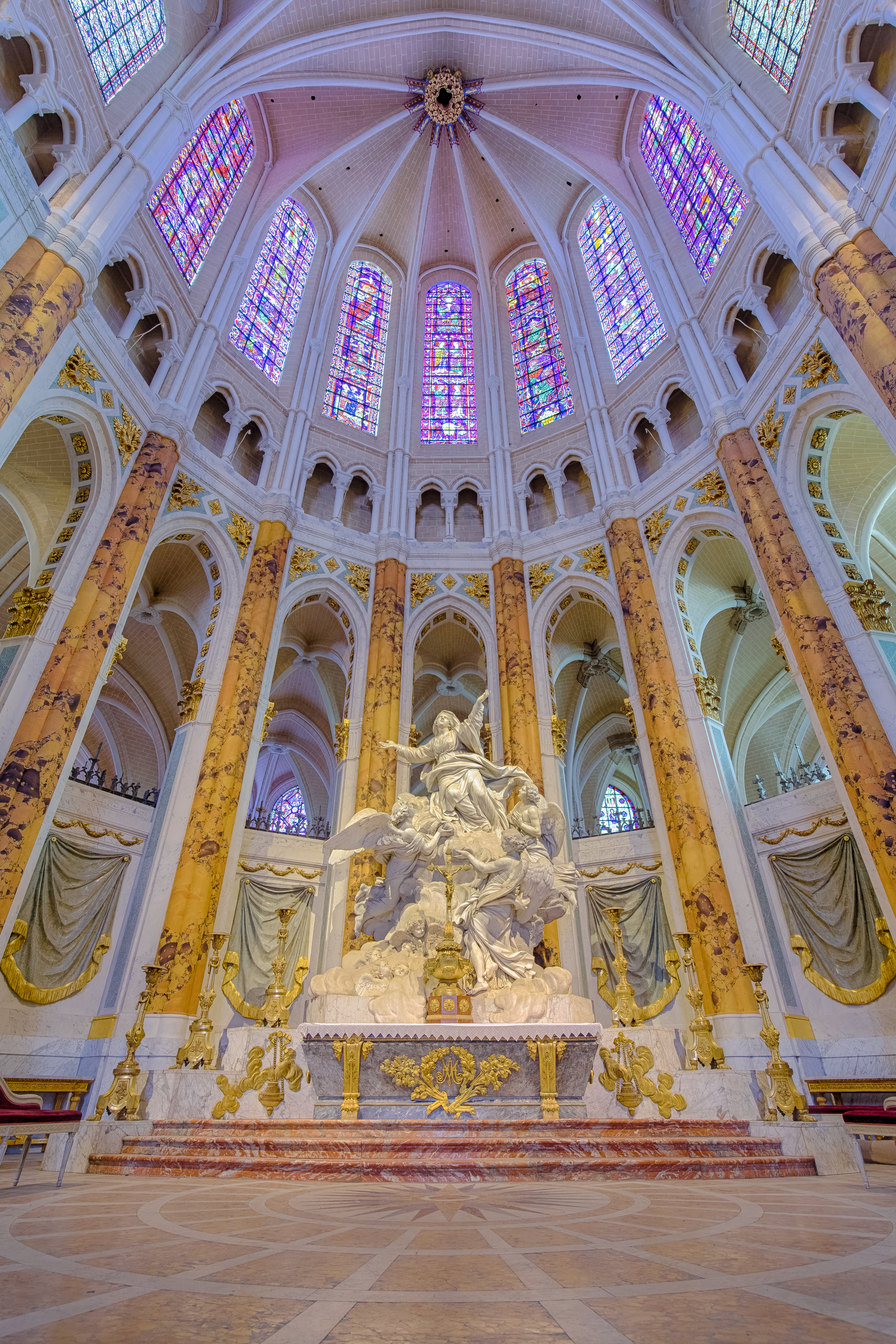 Autel de la cathédrale Notre-Dame de Chartres .